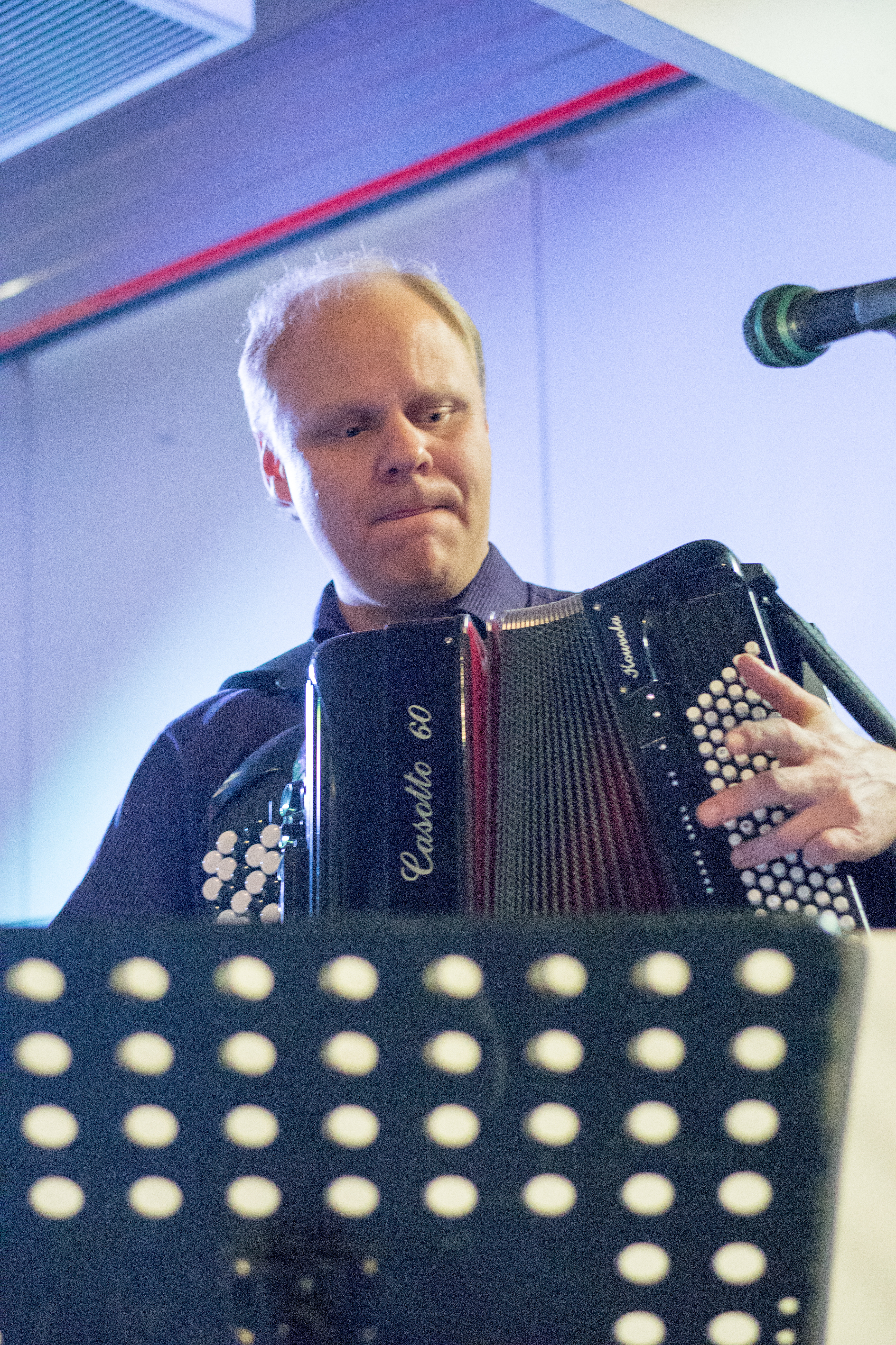 Jani Helenius suomalainen haitaristi